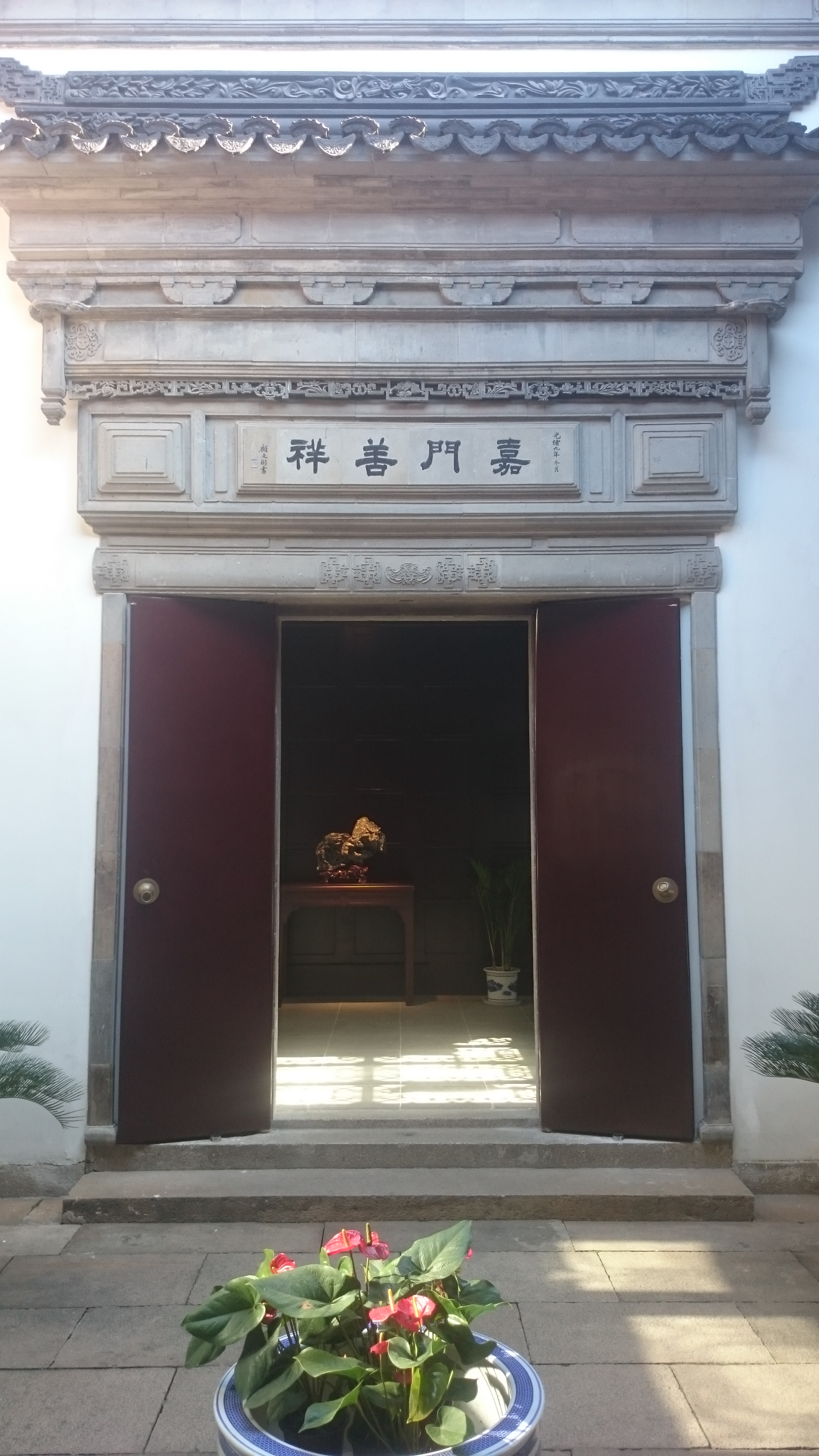 柴园 苏州教育博物馆 大厅门楼